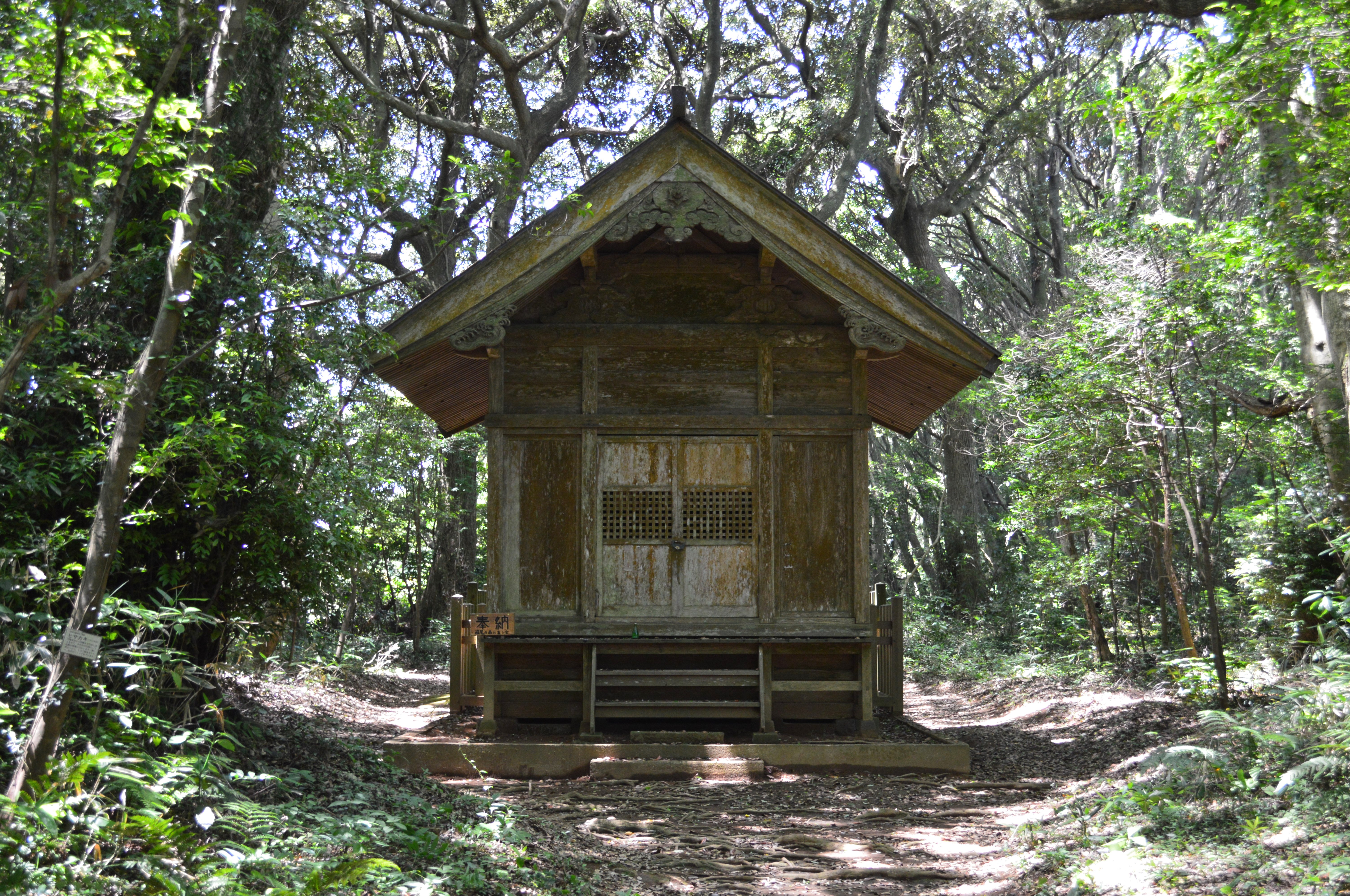 鹿島神宮境外摂社 沼尾神社 拝殿 (正面より)